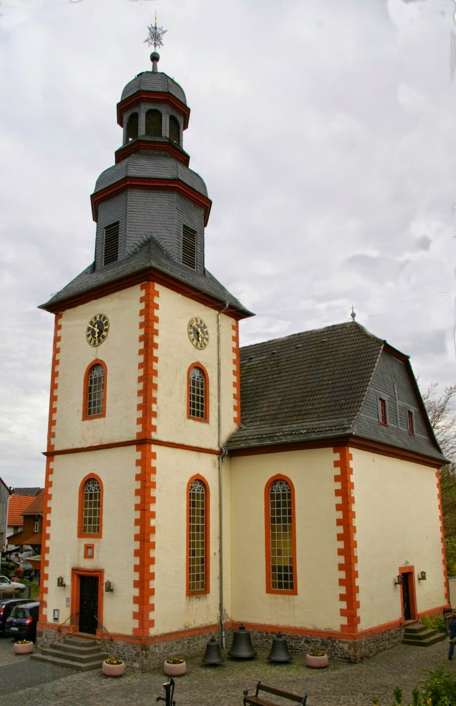 Evangelische Kirche Rupppertsburg, Laubach, Landkreis Gießen, Hessen, Deutschland